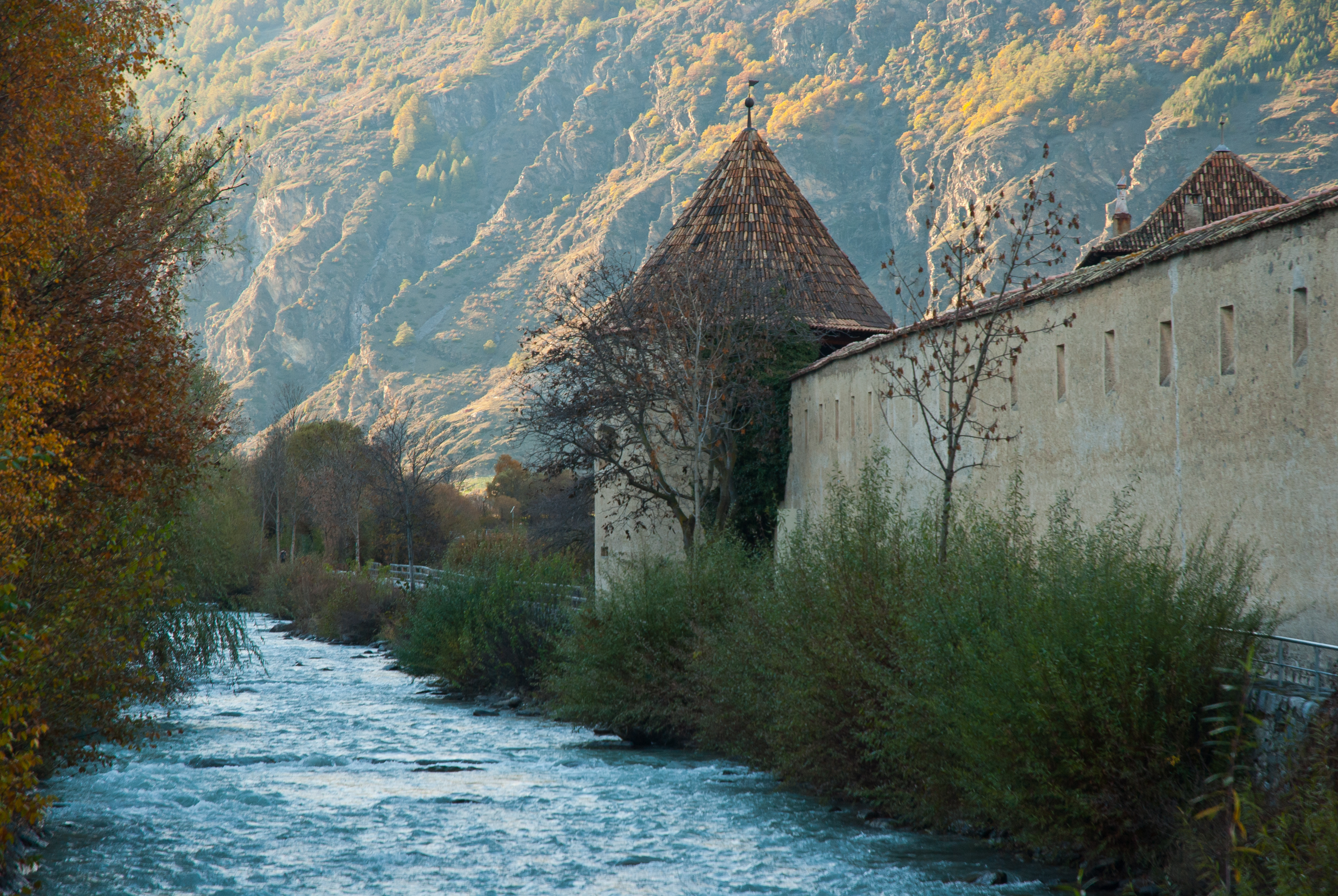 The Etsch river (Adige) in Glurns